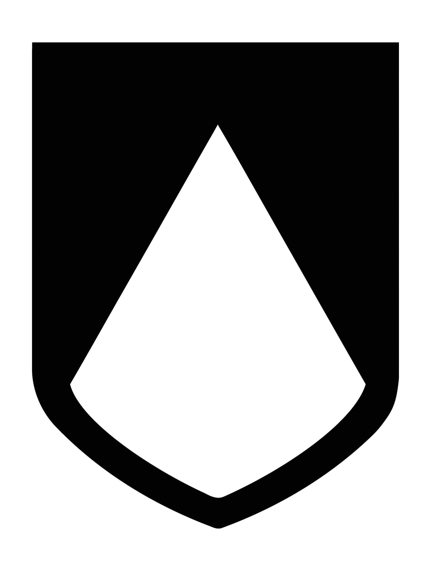 Escudo de la Orden de Predicadores 2